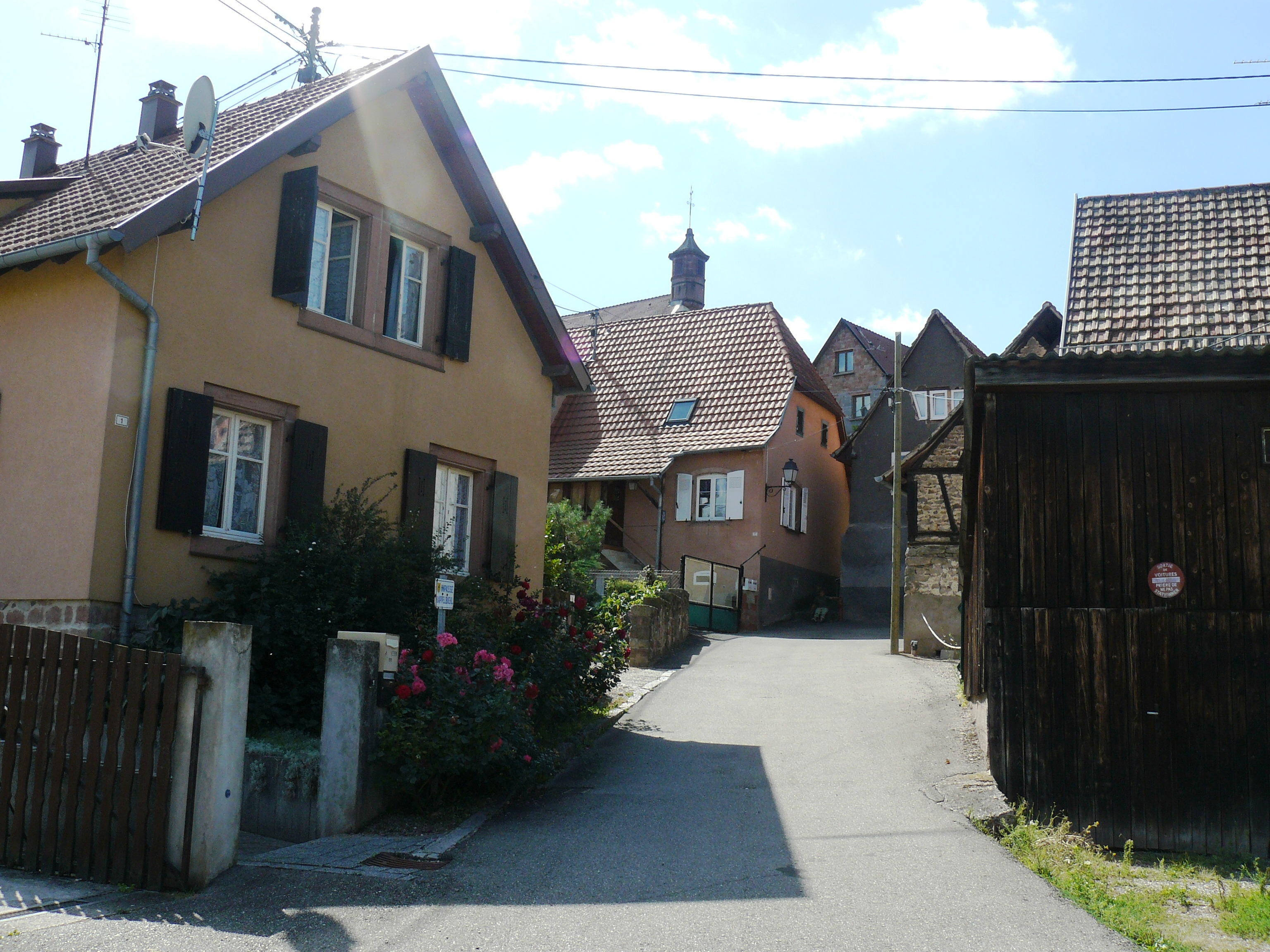 La rue de l'église